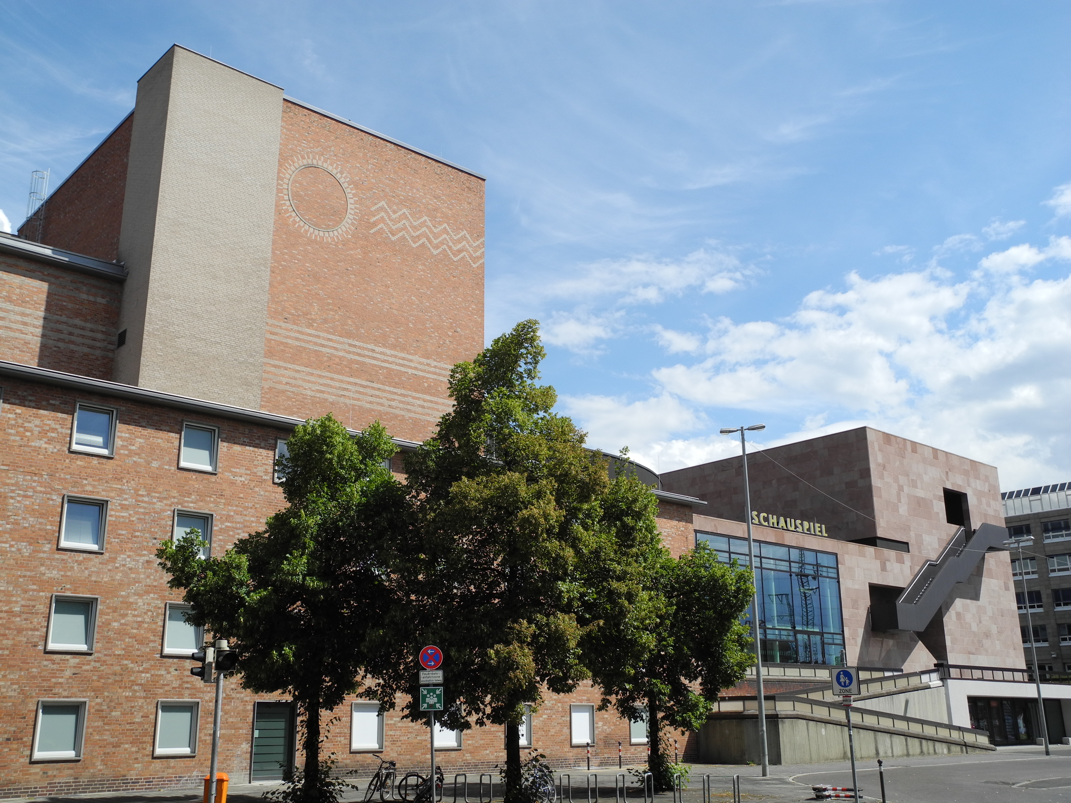 Das Schauspielhaus am Staatstheater Nürnberg, Ansicht vom Karl-Pschigode-Platz